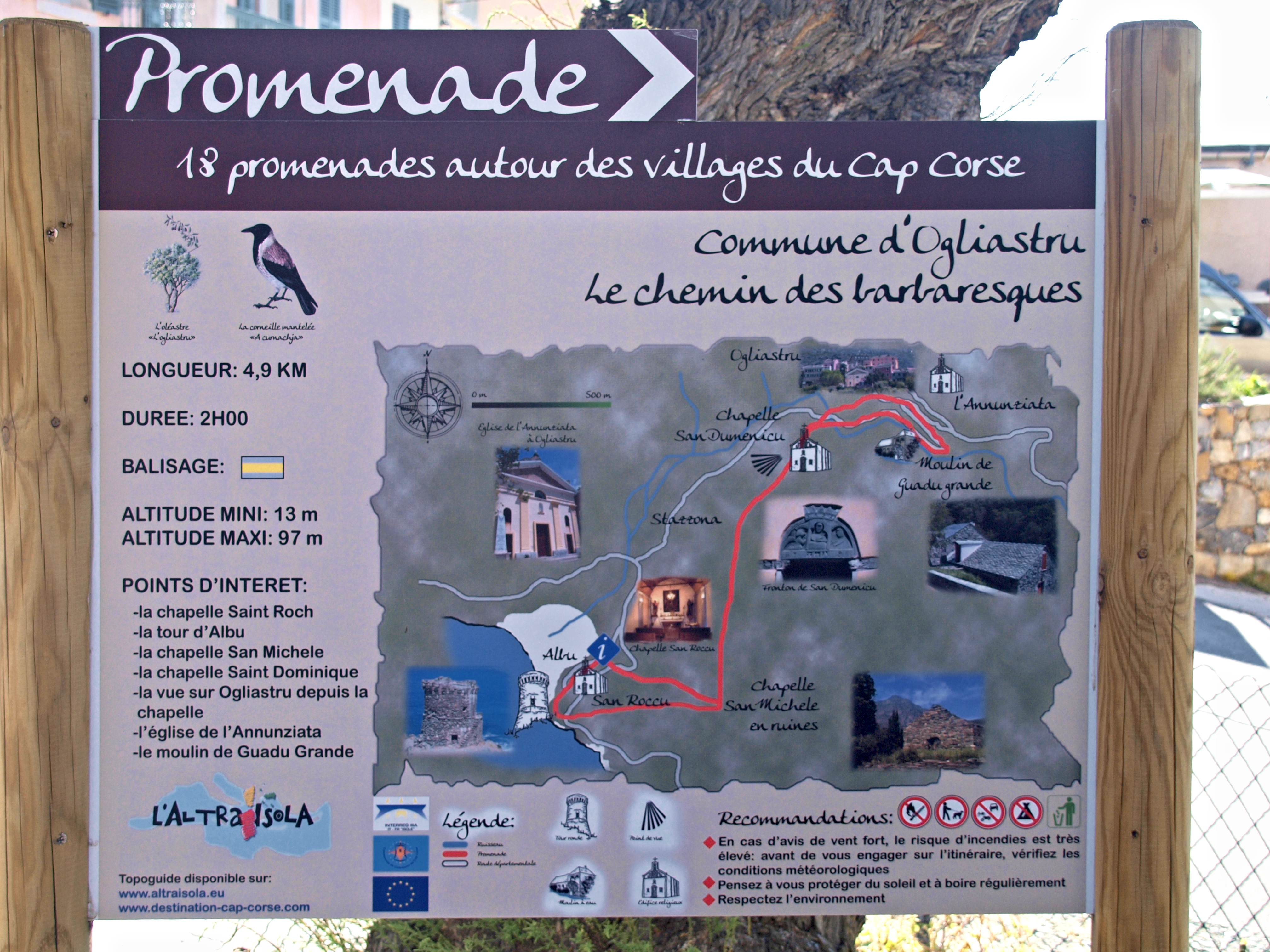 Ogliastro (Corsica) - Panneau "Promenade"